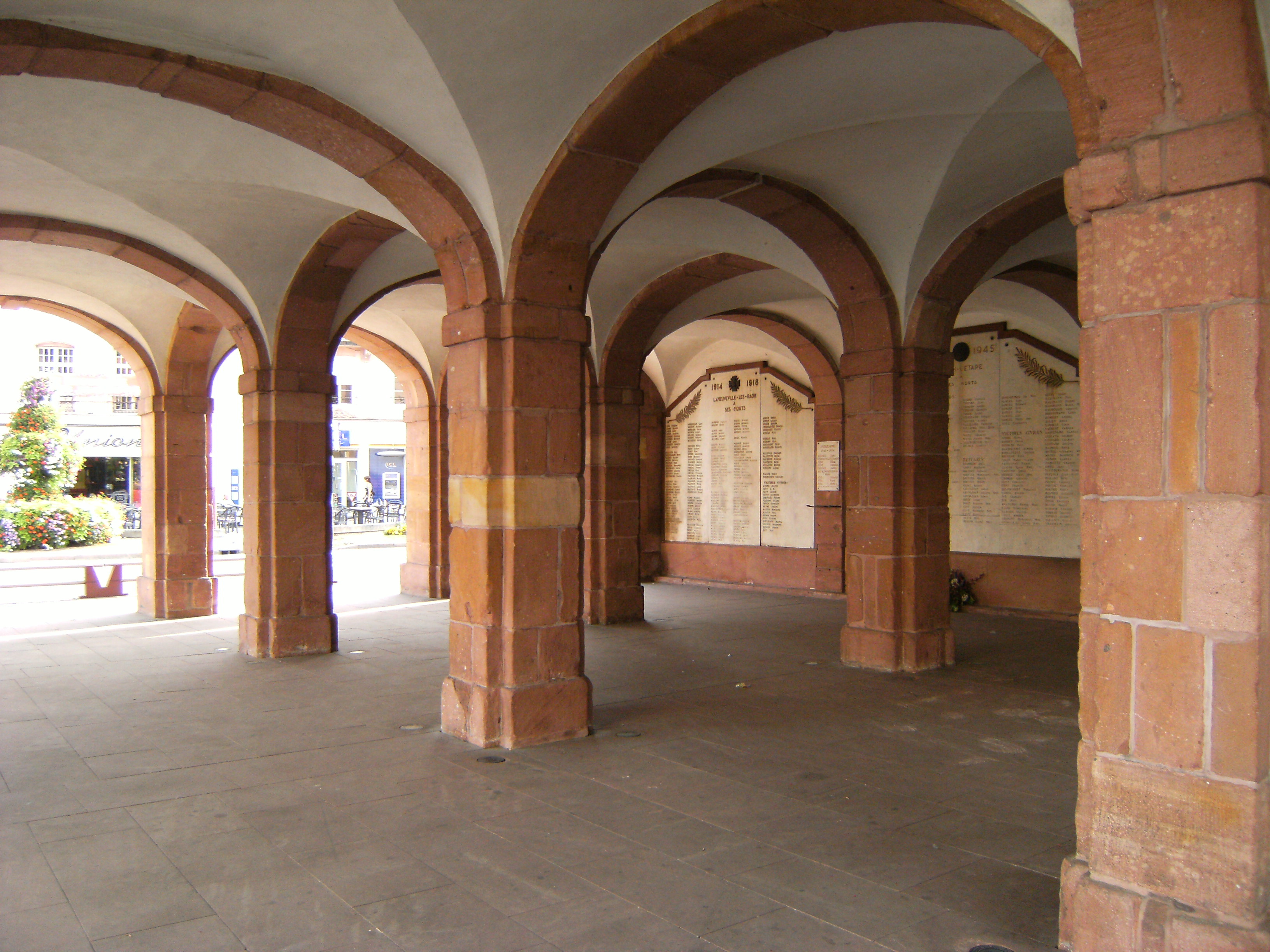 Les arcades de la mairie de Taon L'Étape